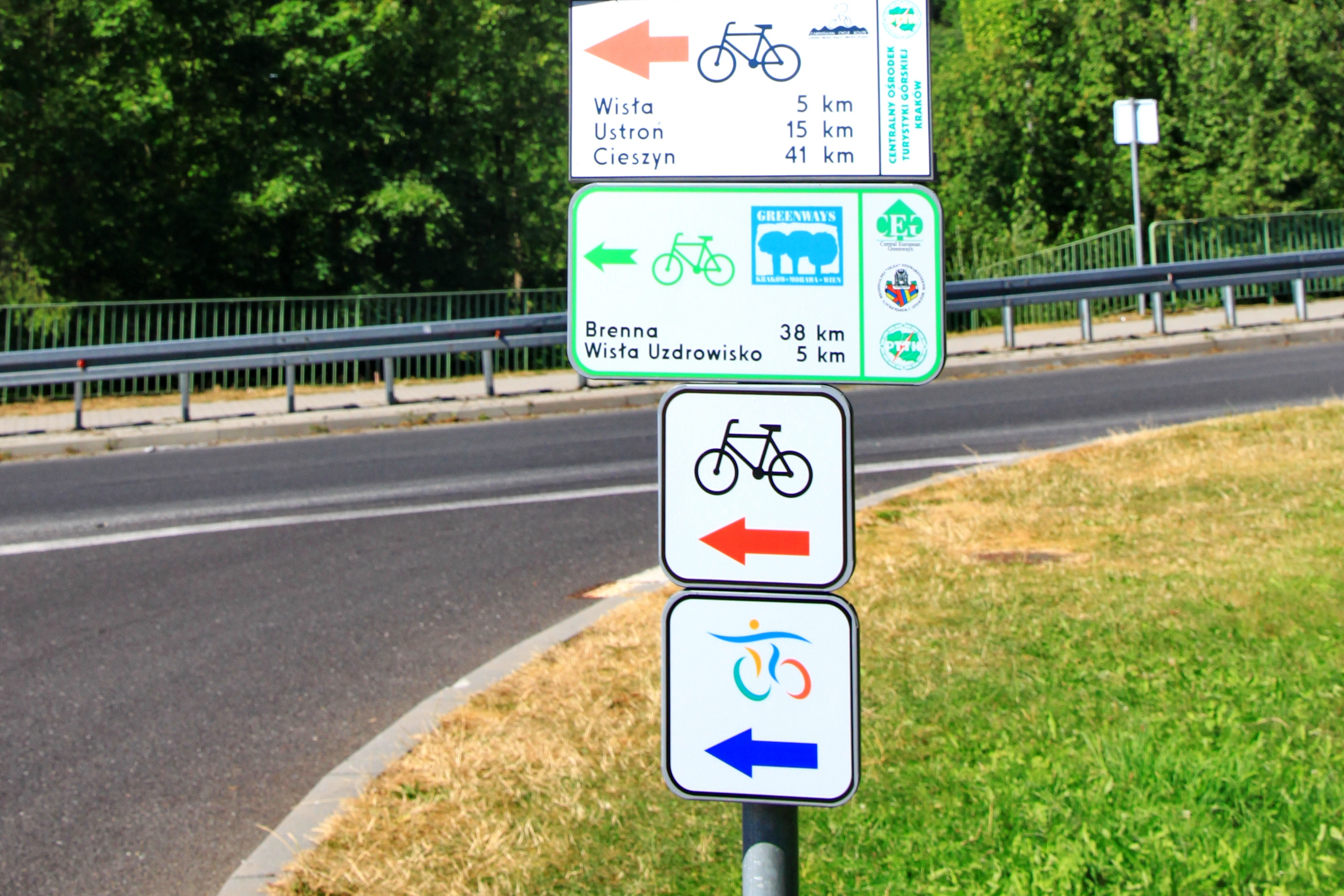 Tablice tras rowerowych w Wiśle-Głębce: 1. Główny Karpacki Szlak Rowerowy, 2. Międzynarodowy Szlak Rowerowy Greenways Kraków-Morawy-Wiedeń, 3. czerwona trasa rowerowa nr 24, 4. Wiślana Trasa Rowerowa